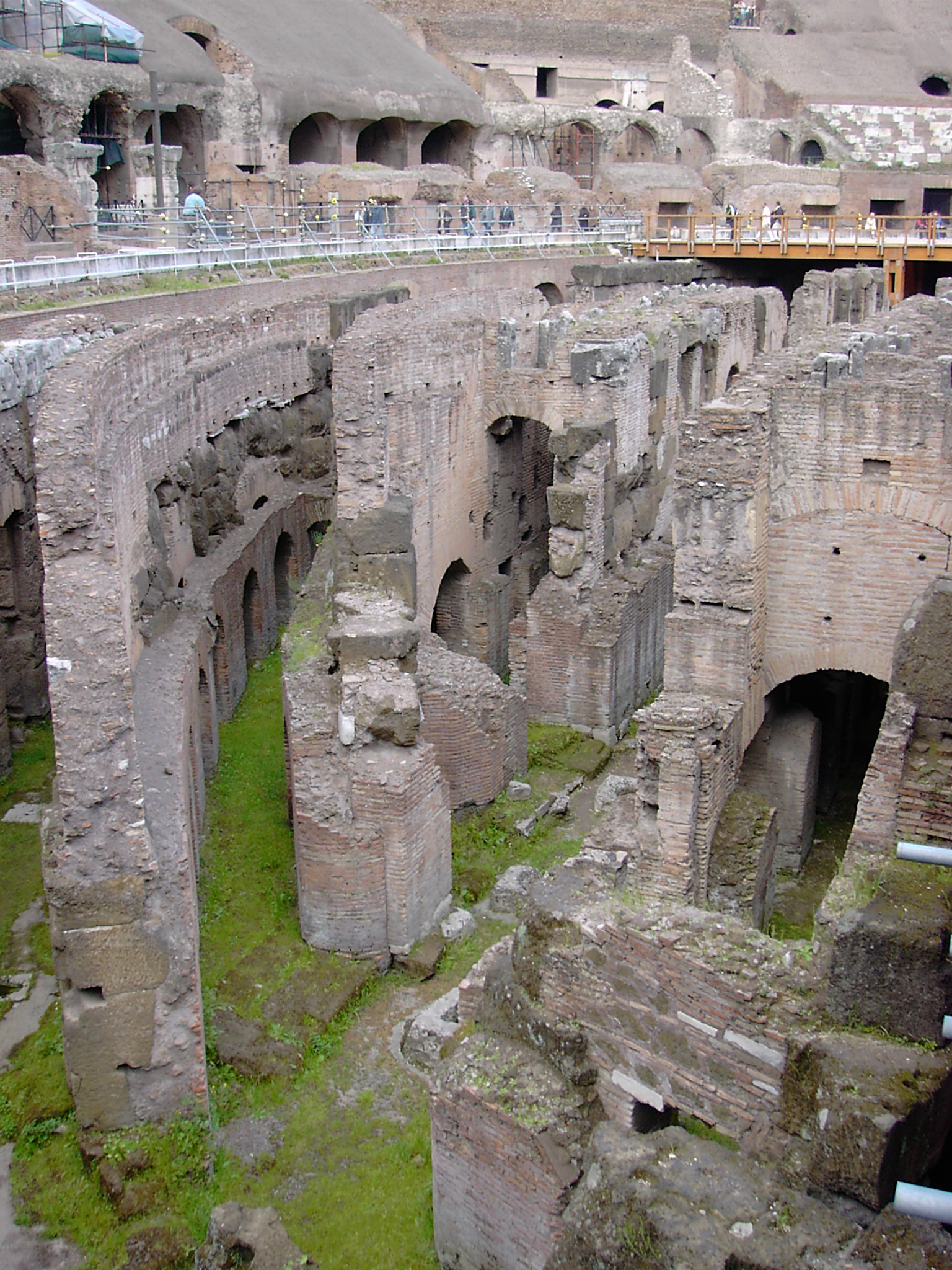 Unterkellerung des Kolosseums in Rom. Selbst aufgenommen am 14.02.2002.